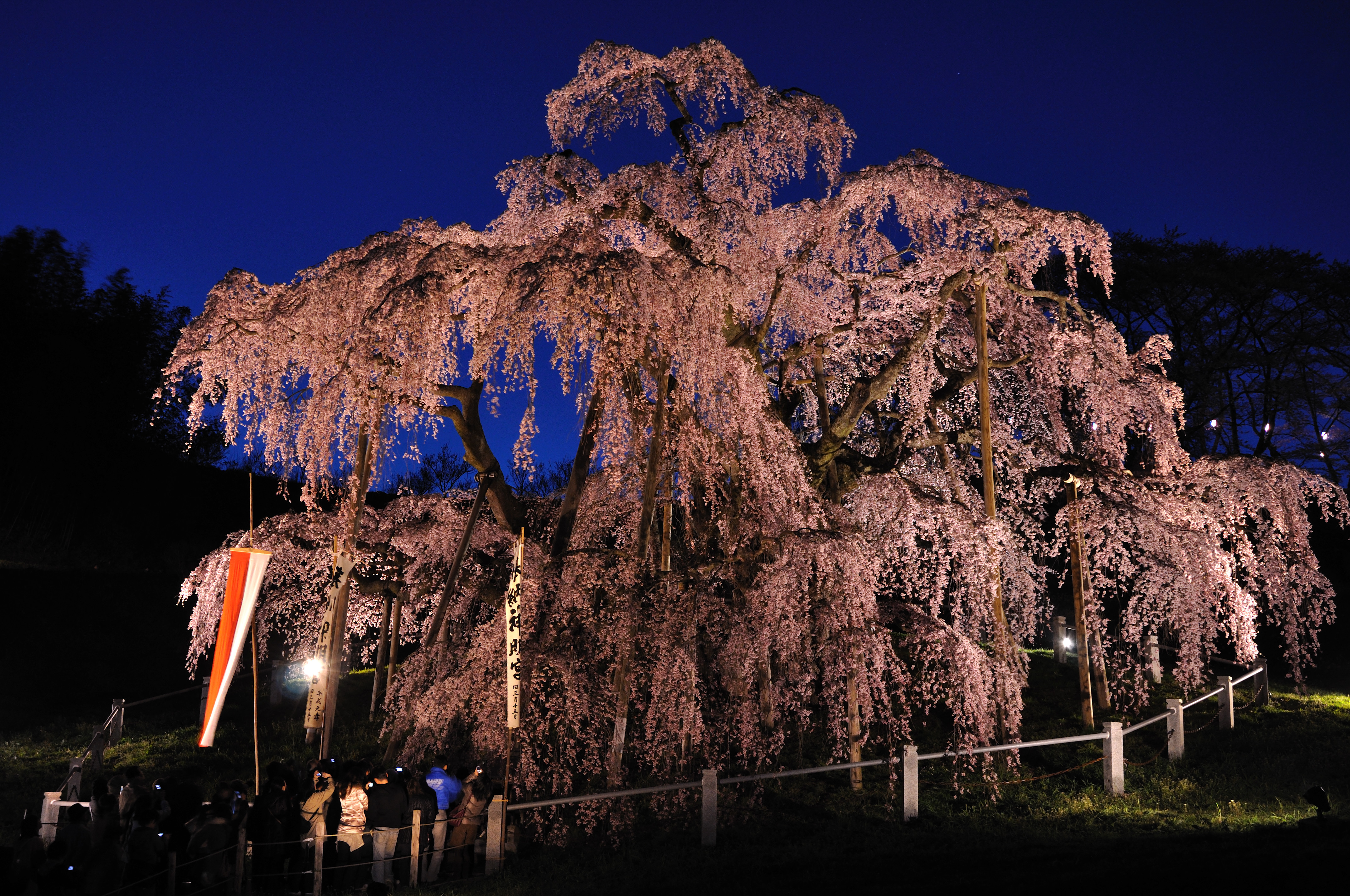 Sat, April 24, 2010